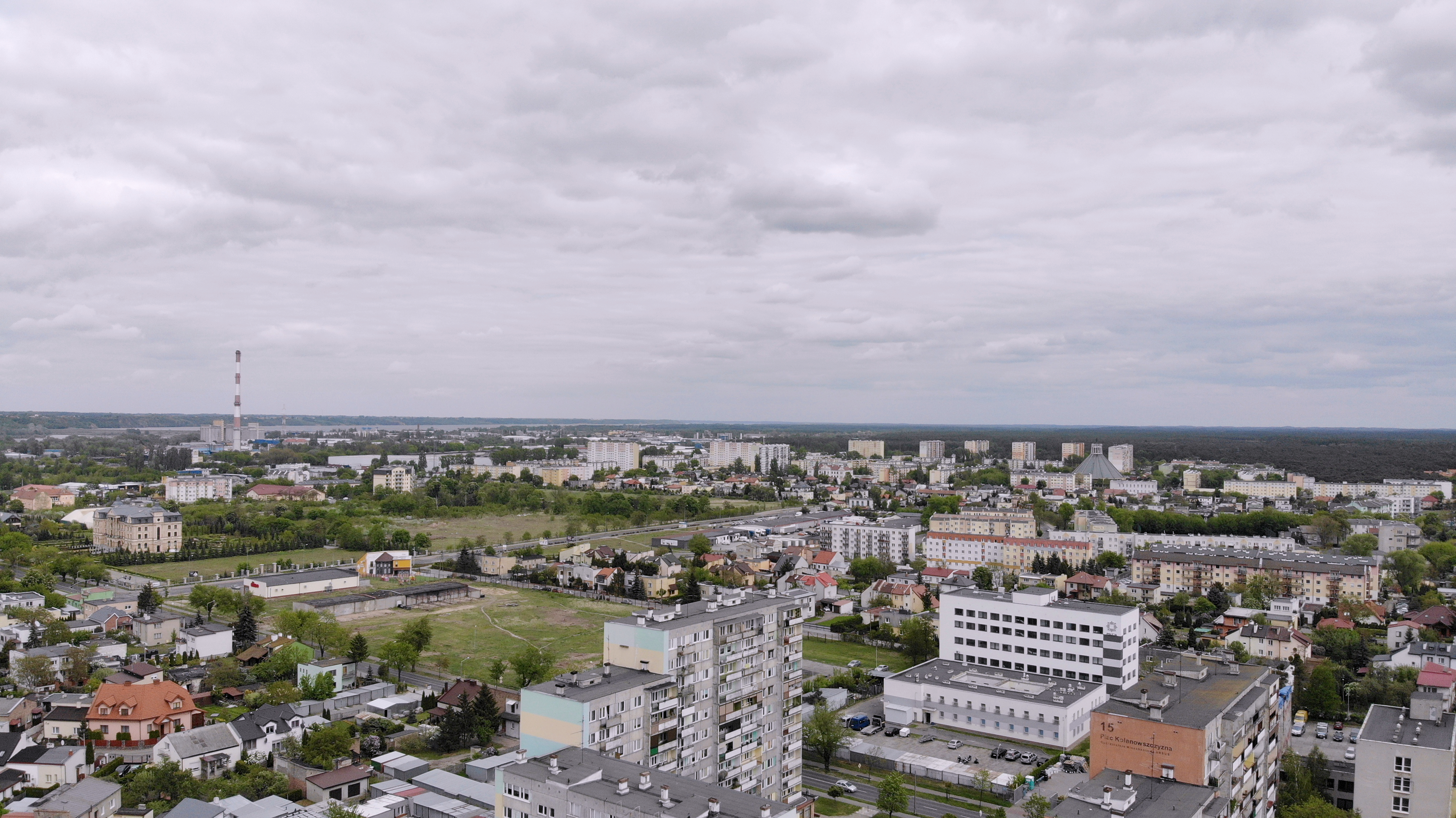 Styk Śródmieścia i Kazimierza Wielkiego (2020 r.)